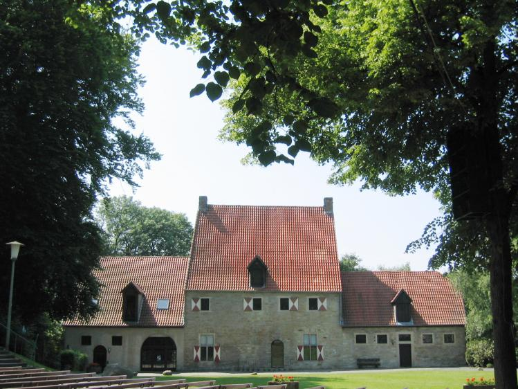 Malinckrodthaus, ältestes Burgmannenhaus Westfalens.